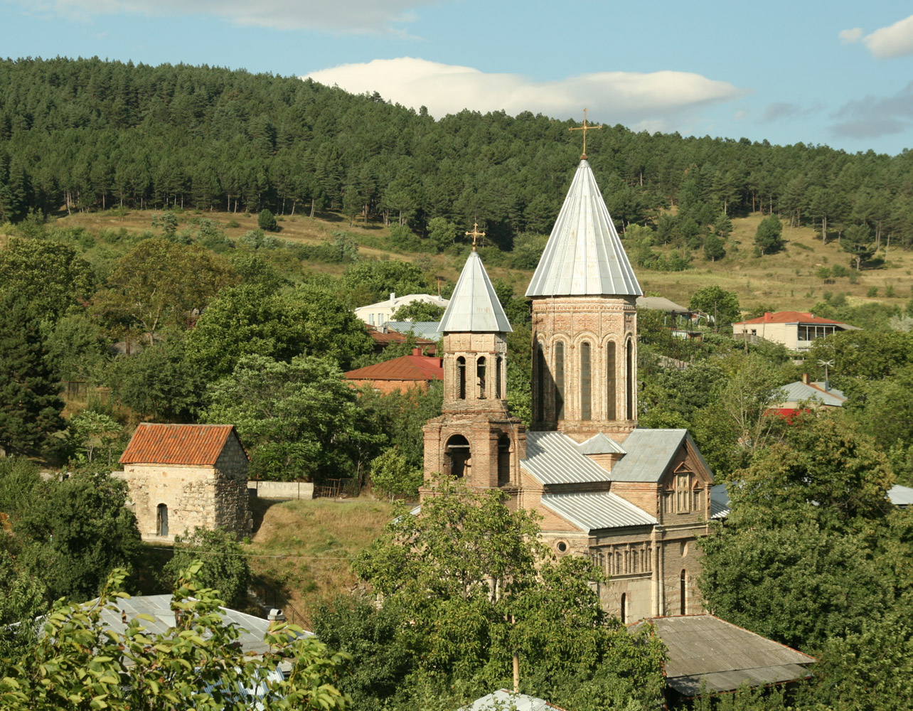 სურამის წმინდა გიორგის ეკლესია